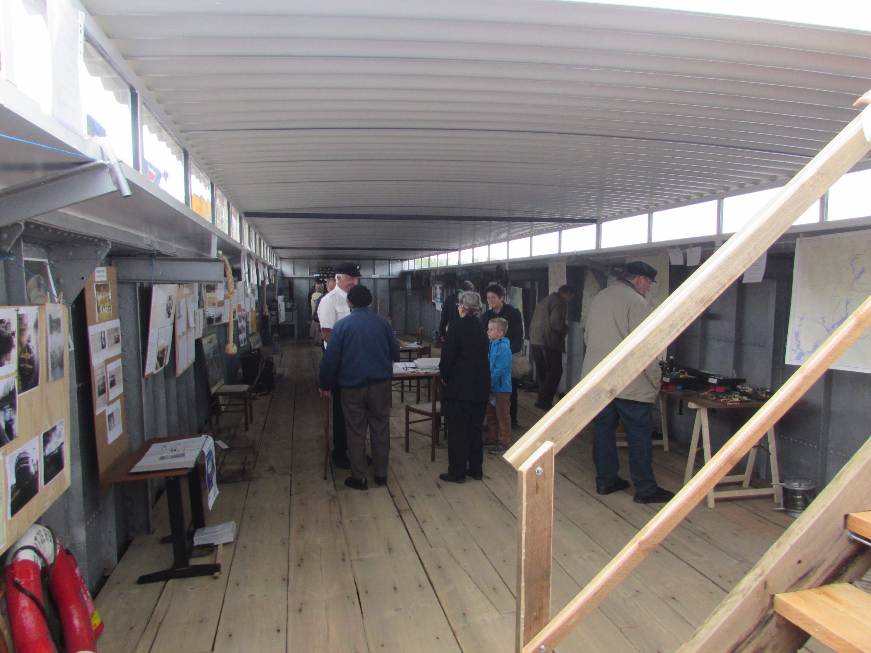 ausstellungsräume des museumsschiffs ilse-lucie in pritzerbe